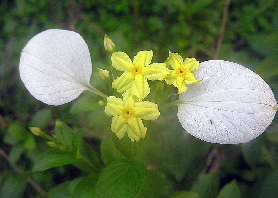 Pseudomussaenda flava